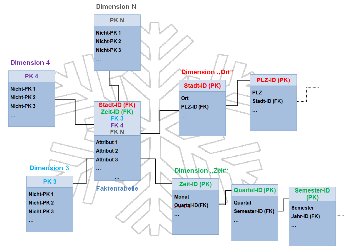 Snowflake Schema: Fakt- und Dimensionstabellen bilden eine schneeflockenförmige Struktur und werden im Unterschied zum Star-Schema weiter verfeinert und normalisiert